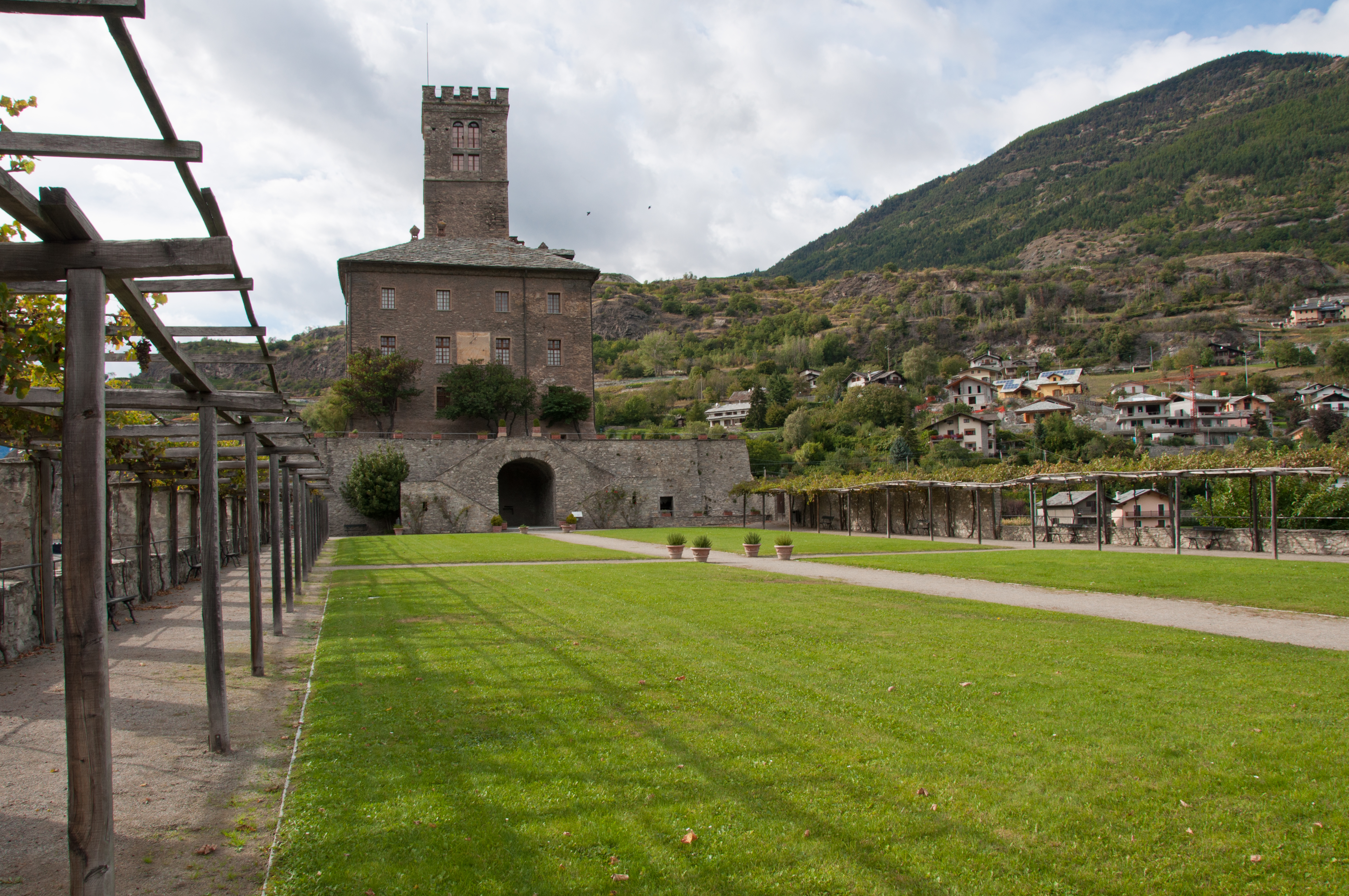 Castello Reale di Sarre è situato su di un poggio nella conca di Aosta e domina l'ingresso all'alta Valle. Il suo aspetto attuale risale ai primi decenni del XVIII secolo, ma la struttura si articola intorno ad un nucleo più antico, eretto probabilmente tra il XI e il XII secolo. This is a photo of a monument which is part of cultural heritage of Italy.